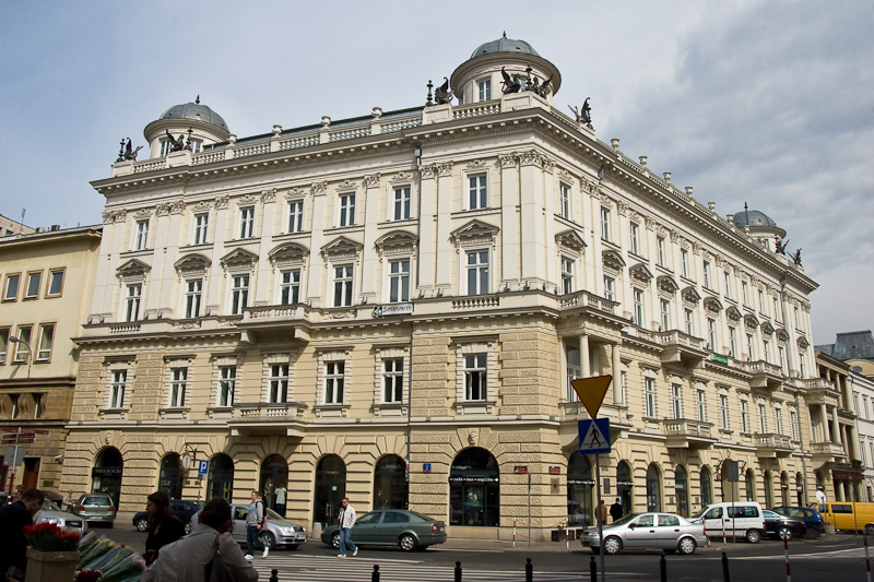 Kamienica Pod Gryfami z przodu